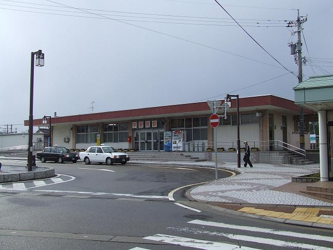 JR宇野気駅表口駅舎